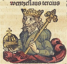 Václav III.